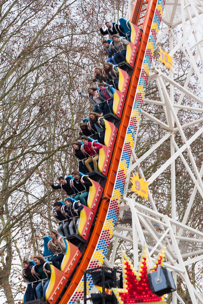 Photo d'un manège lors de la foire Saint-Martin d'Angers en 2012.